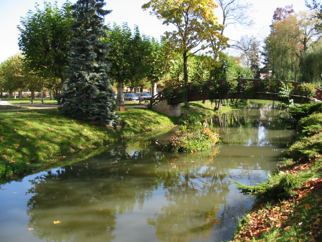 Rivère en face du restaurant Georges Blanc à Vonnas en Bresse